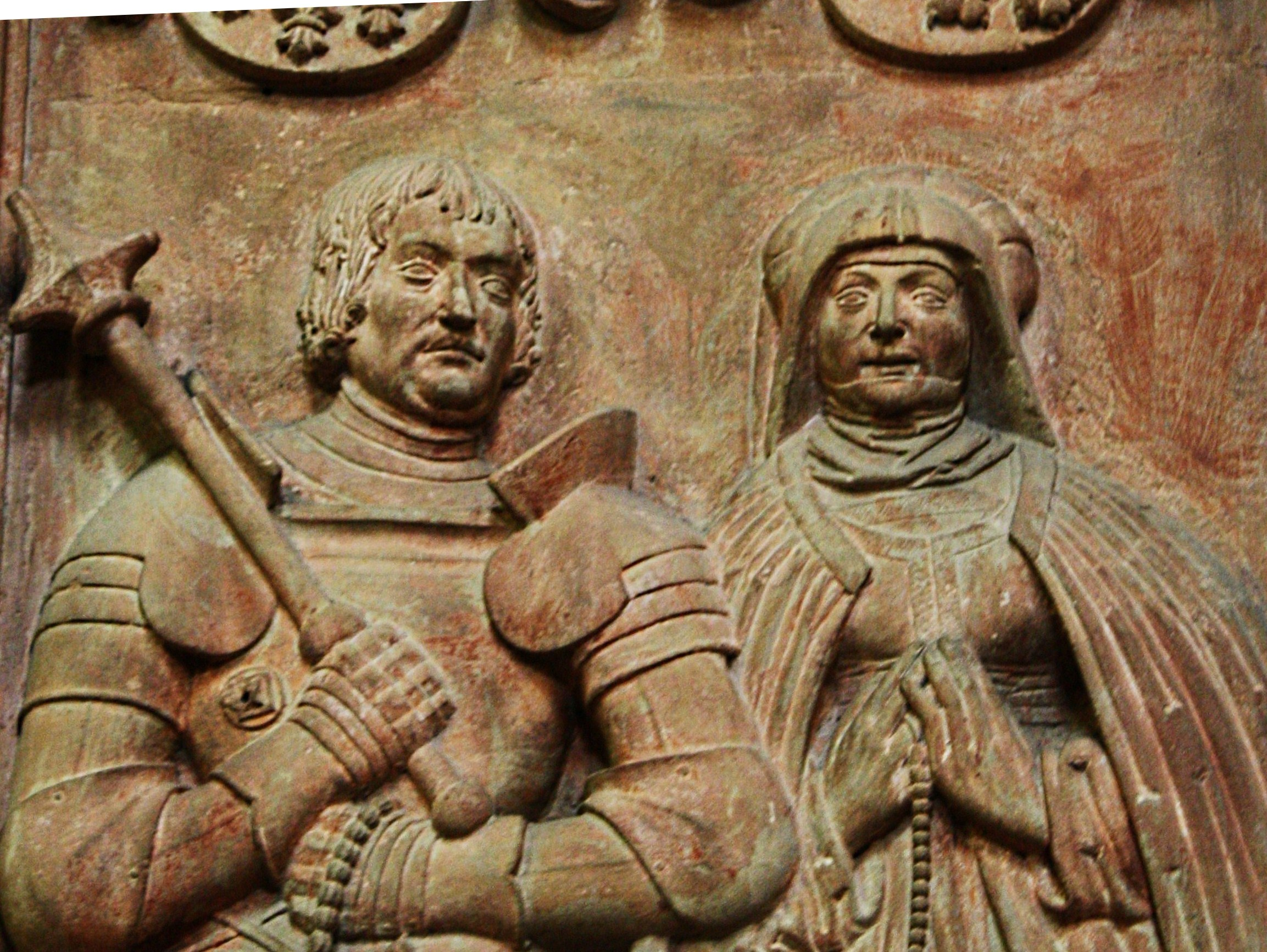 Epitaph (Ausschnitt) Johann (II.) Hilchen von Lorch u. Ehefrau Elsgin von Walderdorff in der Pfarrkirche St. Martin in Lorch im Rheingau. Inschrift: ANNO D(OMI)NI MDXII (1512) DE(N) FR(E)ITAG NACH JAKOBY STARB DER ERNVEST JOHAN(N) HILCHEN VON LORCH UND(D) DI(E)NSTAG DANACH STARB JUNGFRAWE ELSGIN VO(N) WALLERDORF S(E)IN(E) EH(E)LICH HAUSFRAWE DER GOD GNAD UN(D) BARMHERCZICH SII AMEN